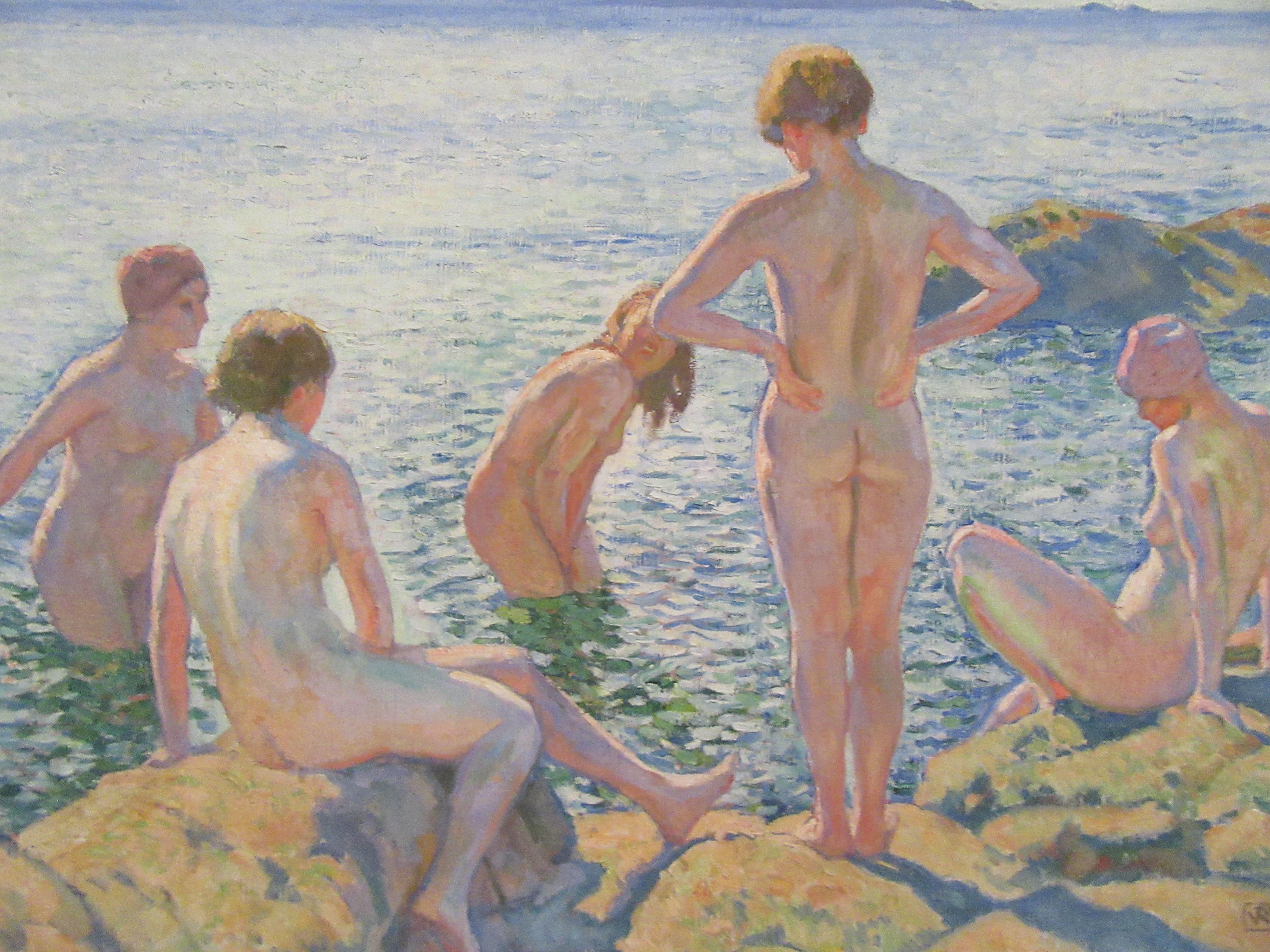 Les baigneuses, Tableau de Théo Van Rysselberghe 1910, Ostende Mu.Zee